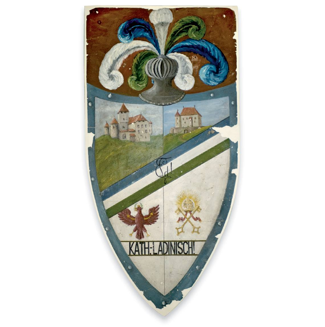 Stemma dell'associazione studentesca LADINIA risalente all'anno 1920